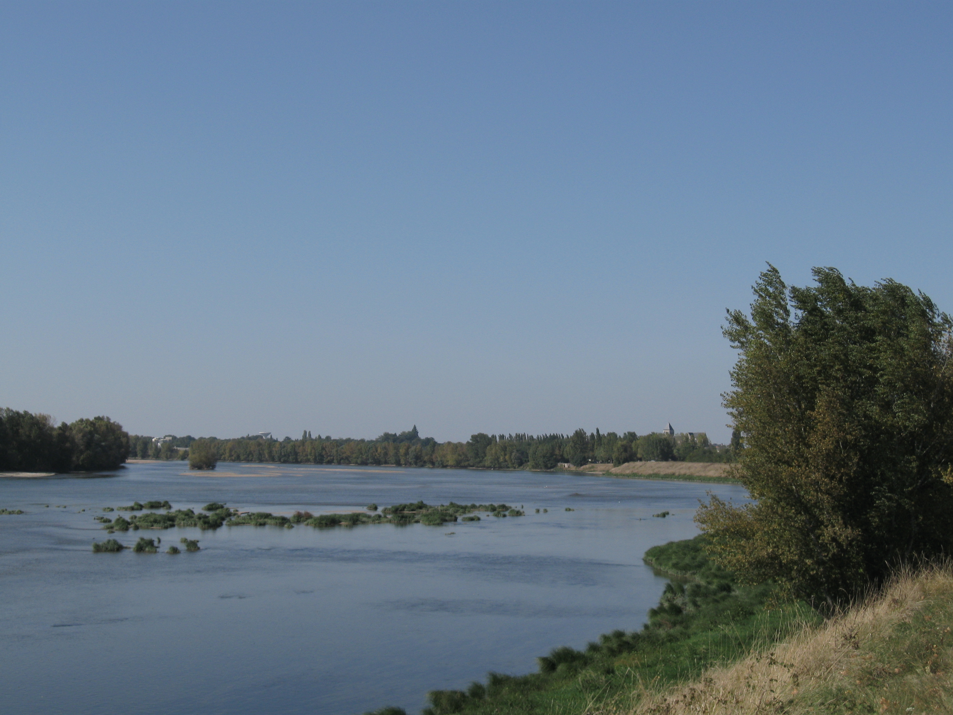 La Loire, Bou, Loiret, France